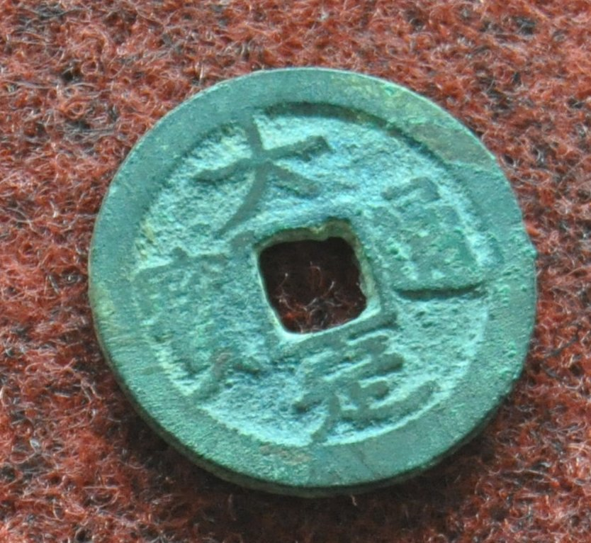 호찌민시에 있는 베트남 역사 박물관, 에 전시된 리 왕조(1009~1225) 의 Lý Anh Tông̣(리영종, 李英宗) 때(1138~1175년) 때의 동전인 Đại Định Thông Bảo 大定通寶(대정통보)